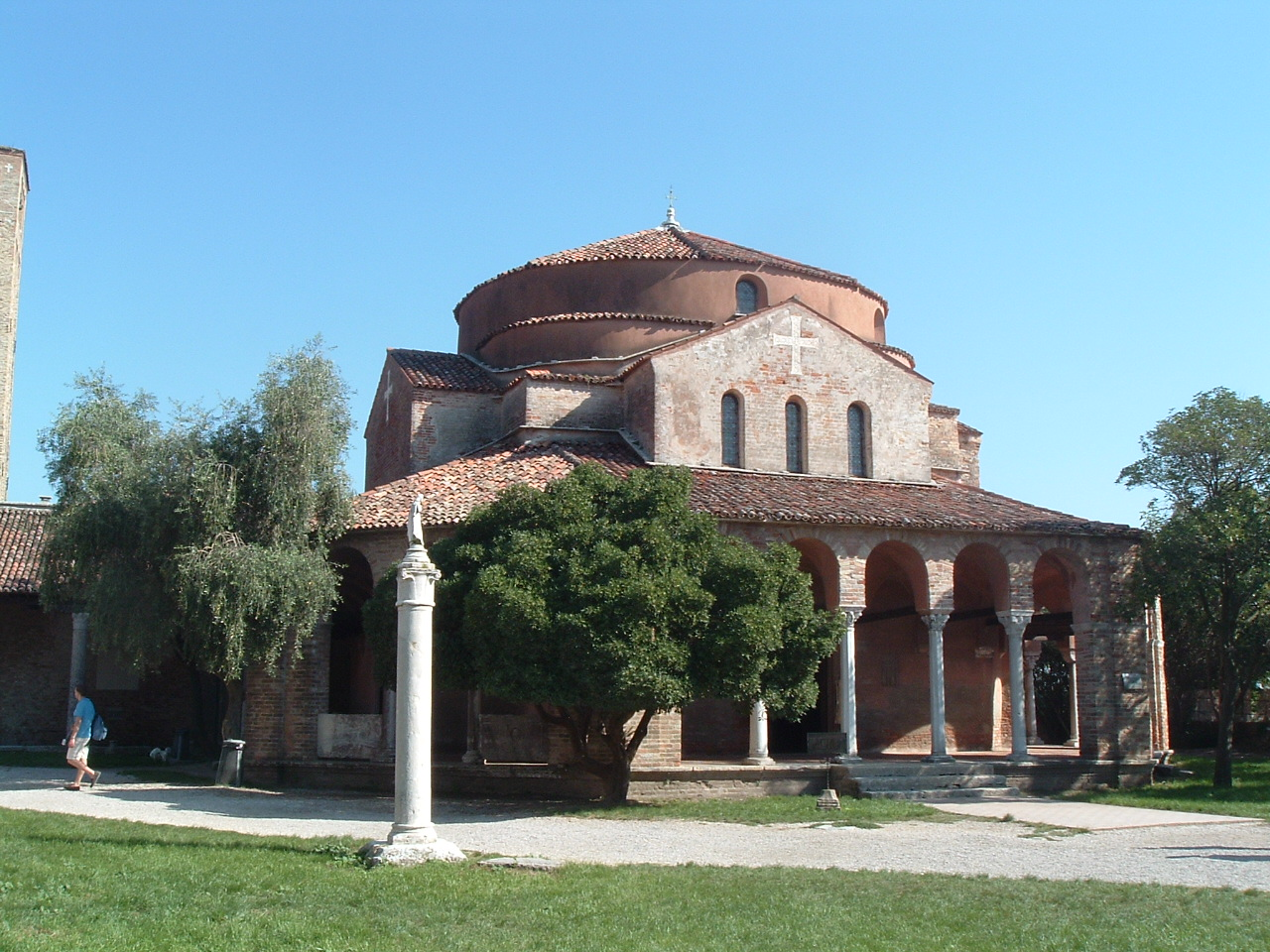 Torcello, Santa Fosca templom